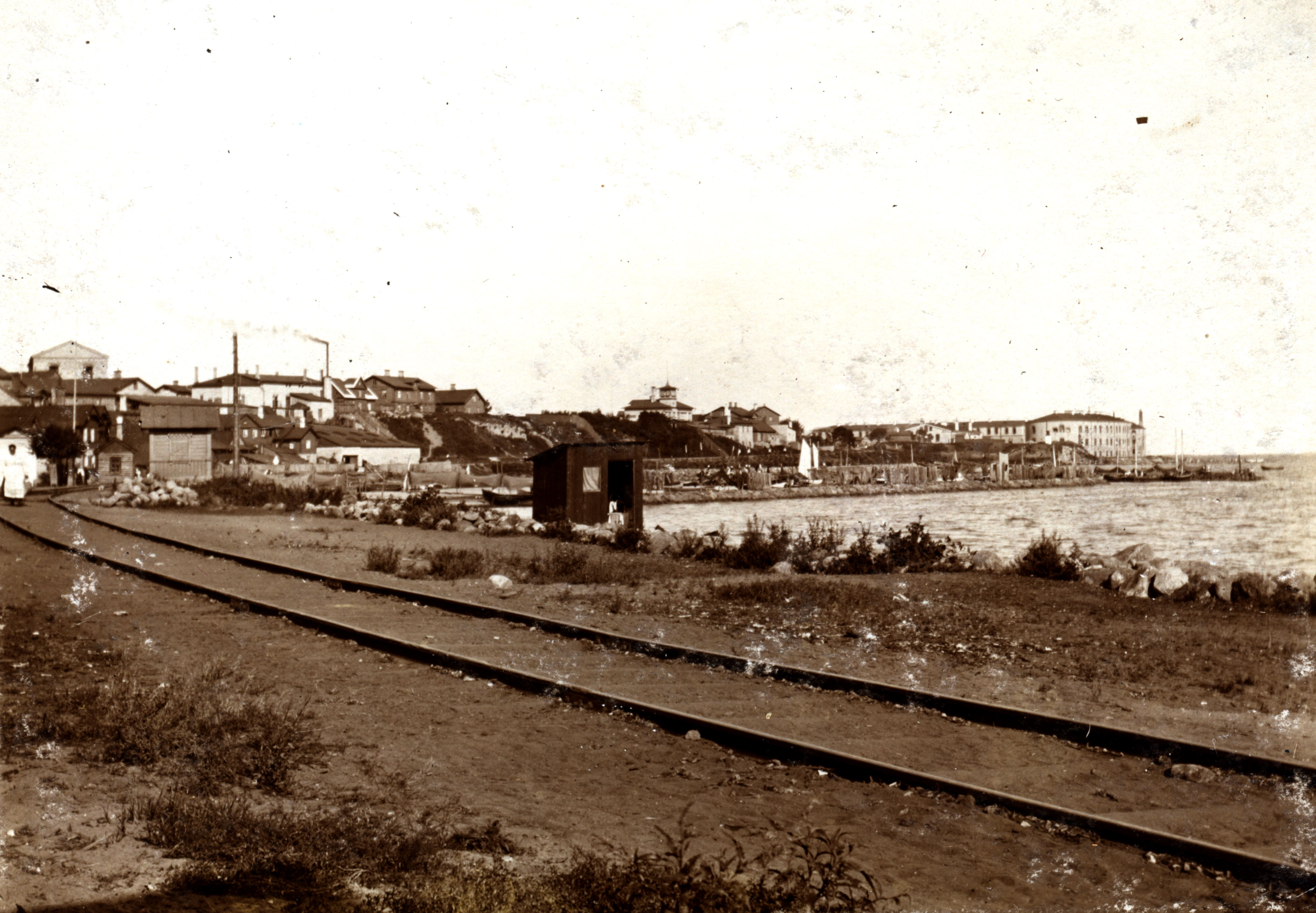 Kalarand Esiplaanil raudteerööpad, taamal Patarei merekindlus